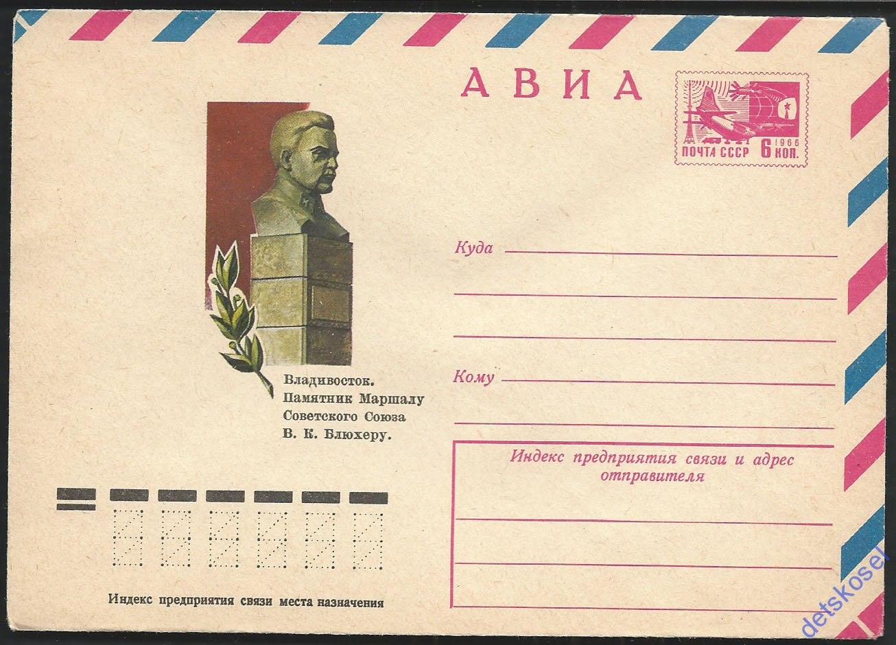 Владивосток Памятник Блюхеру, почтовый конверт